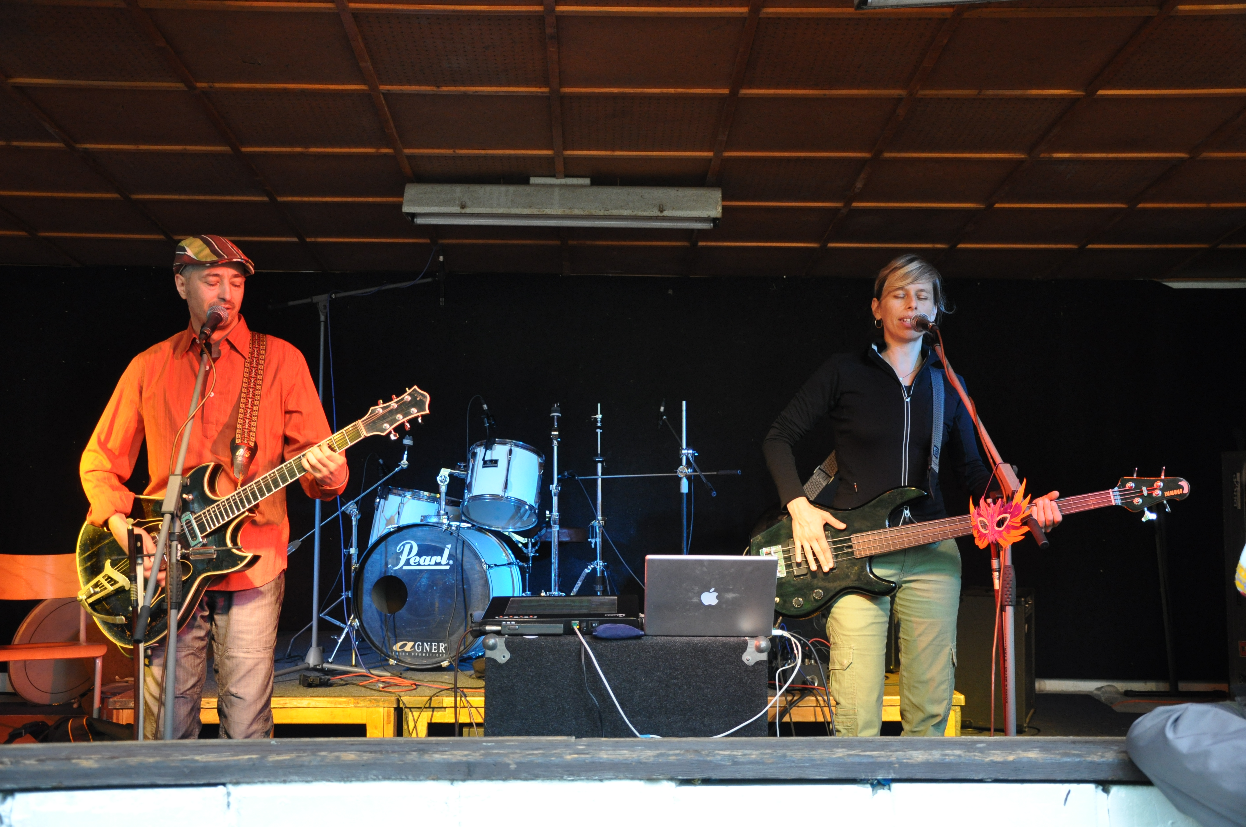 Longital na festivalu Otevřeno Jimramov 2009